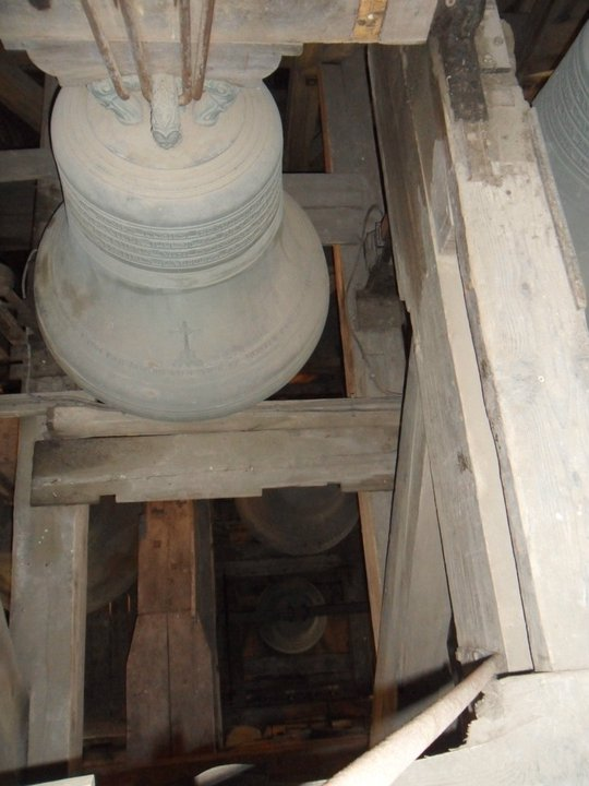 Aperçu du carillon de la cathédrale Notre-Dame des Doms d'Avignon